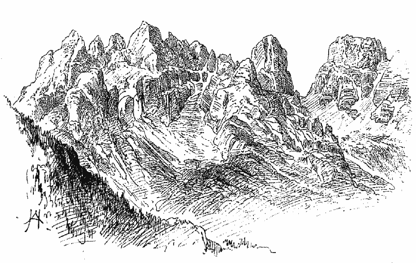 Ansicht des Monte Cristallino vom Dürrensee (1406 m) bei Höhlenstein, Zeichnung von Anton Paul Heilmann nach einer Photographie von B. Johannes